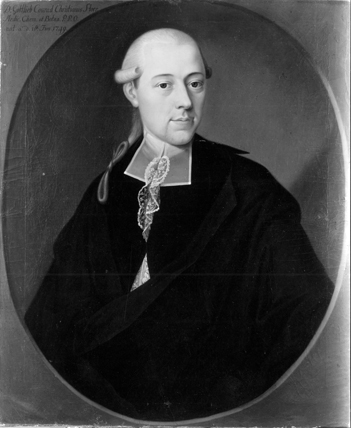 Prof. Gottlob Conrad Christian Storr (Tübinger Professorengalerie)